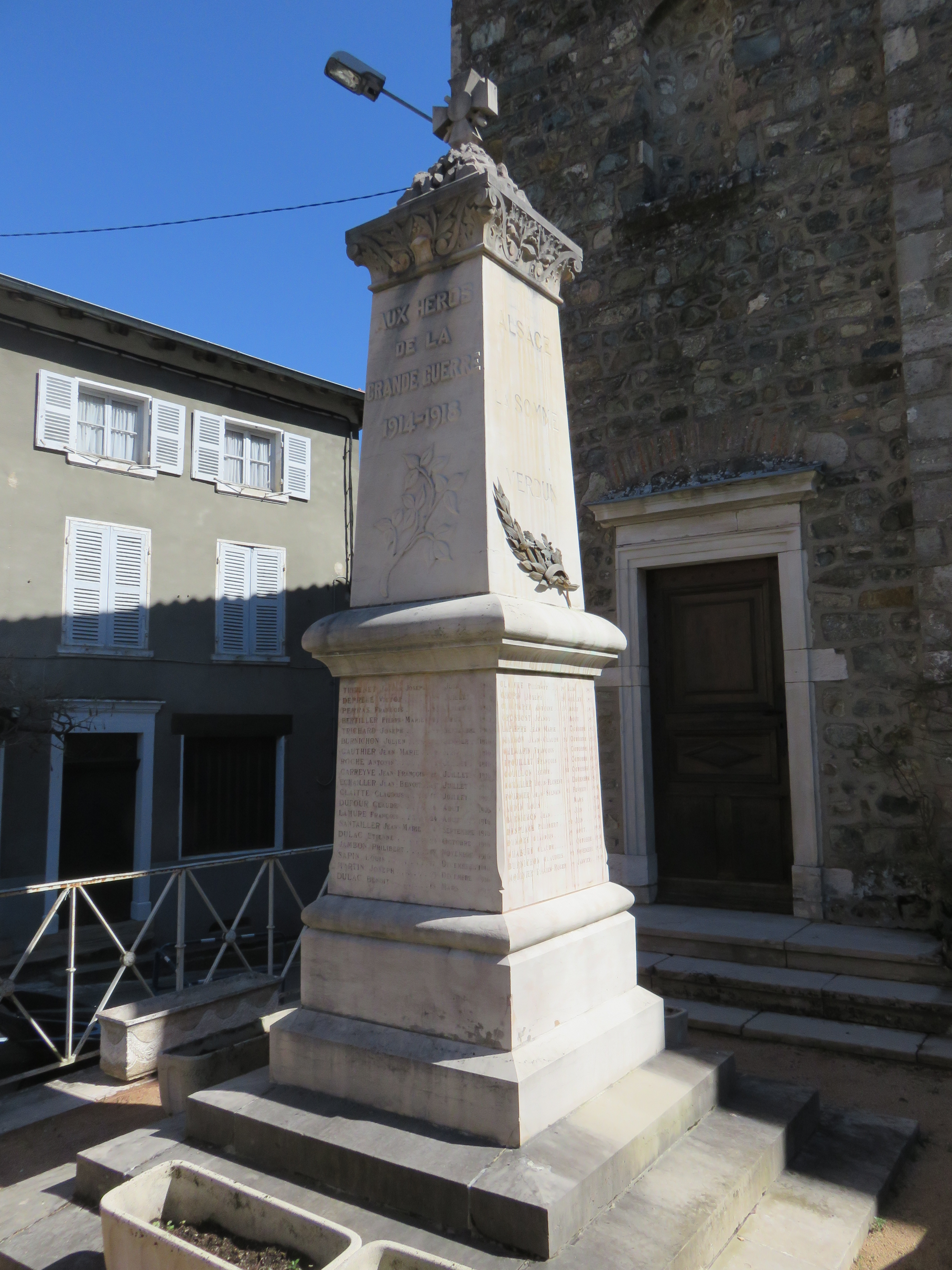 Monument aux morts de Marchampt (Rhône, France).